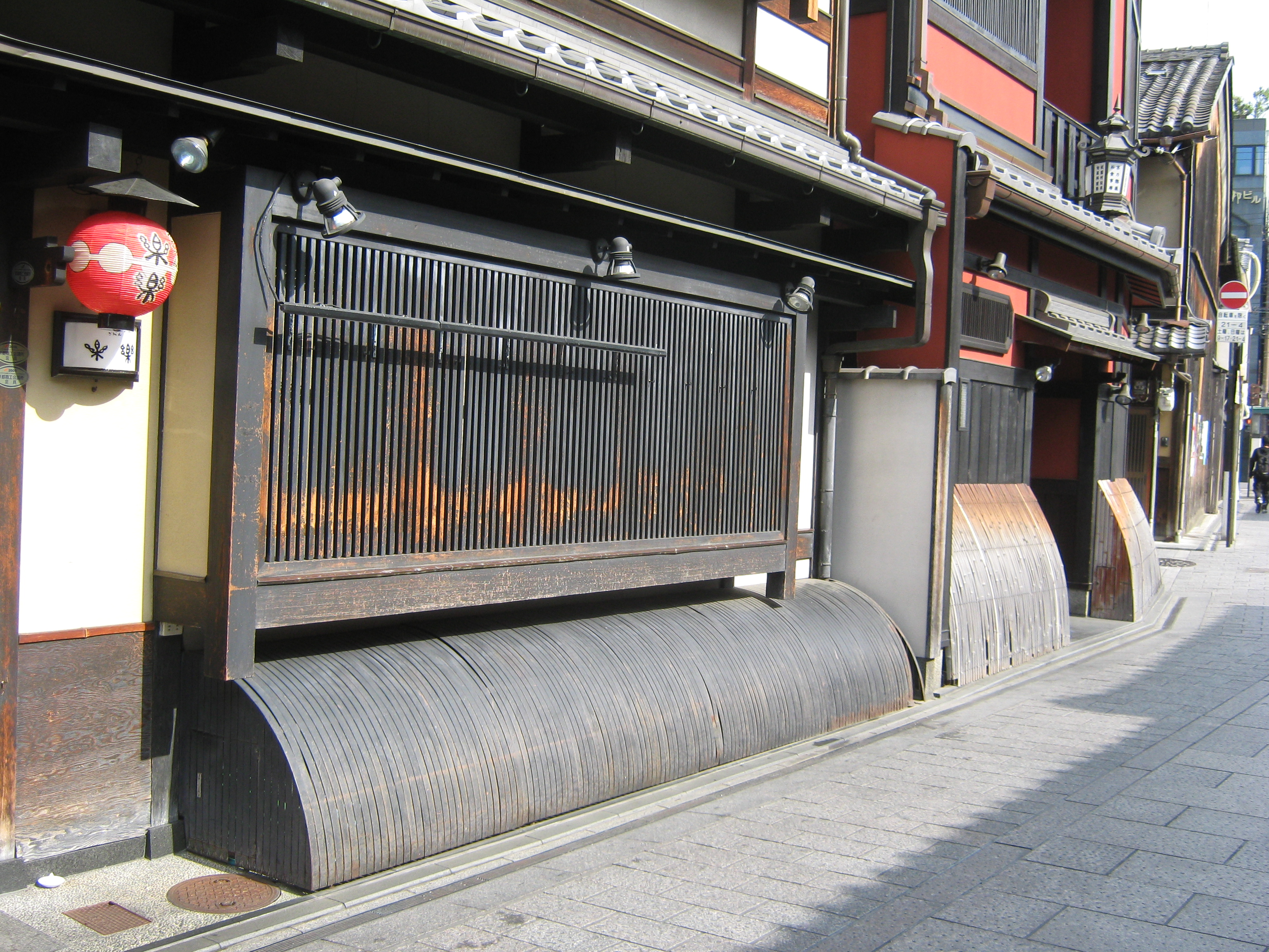 花見小路の京町家の外観。